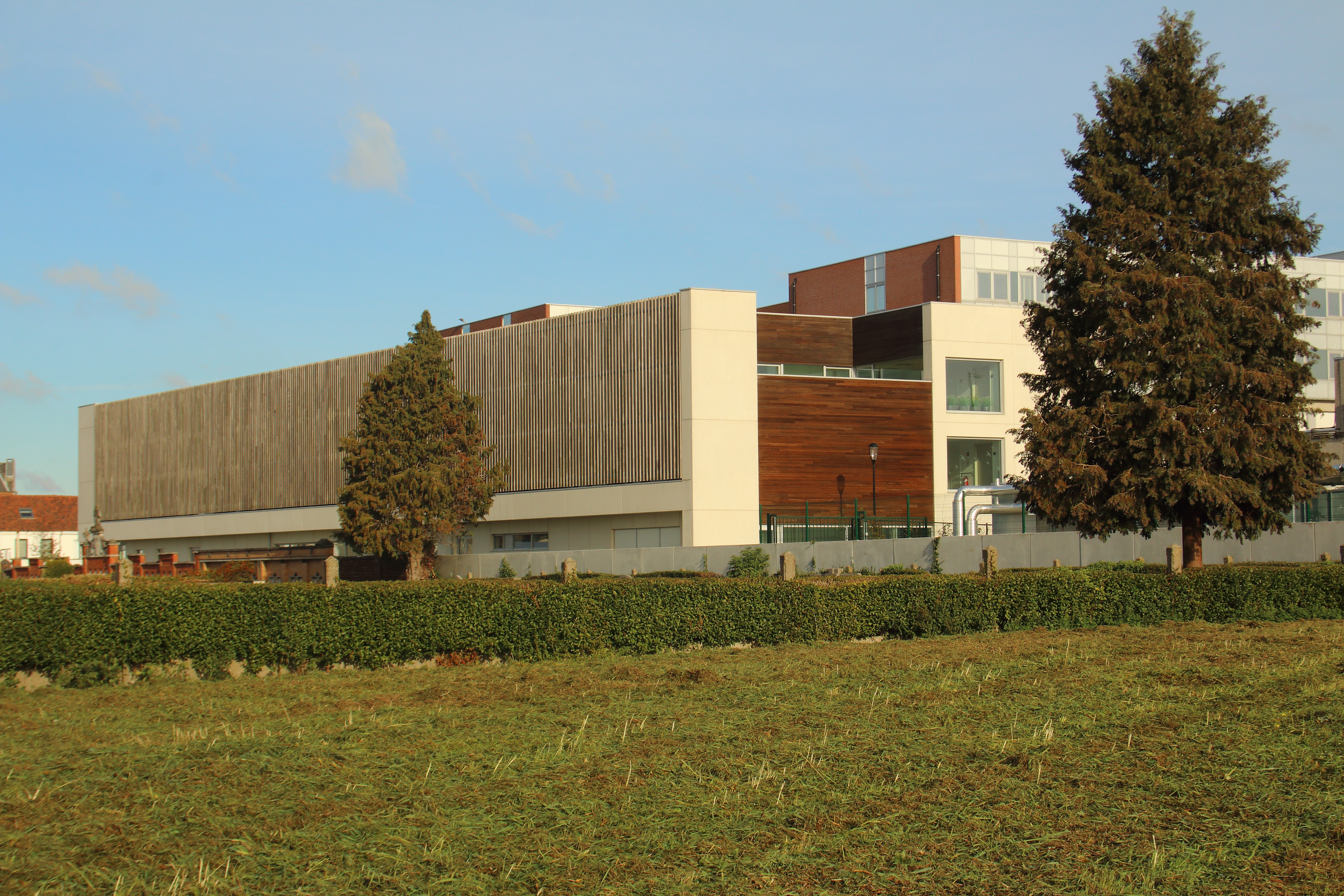 AZ Sint-Elisabeth, Zottegem, Vlaanderen, België